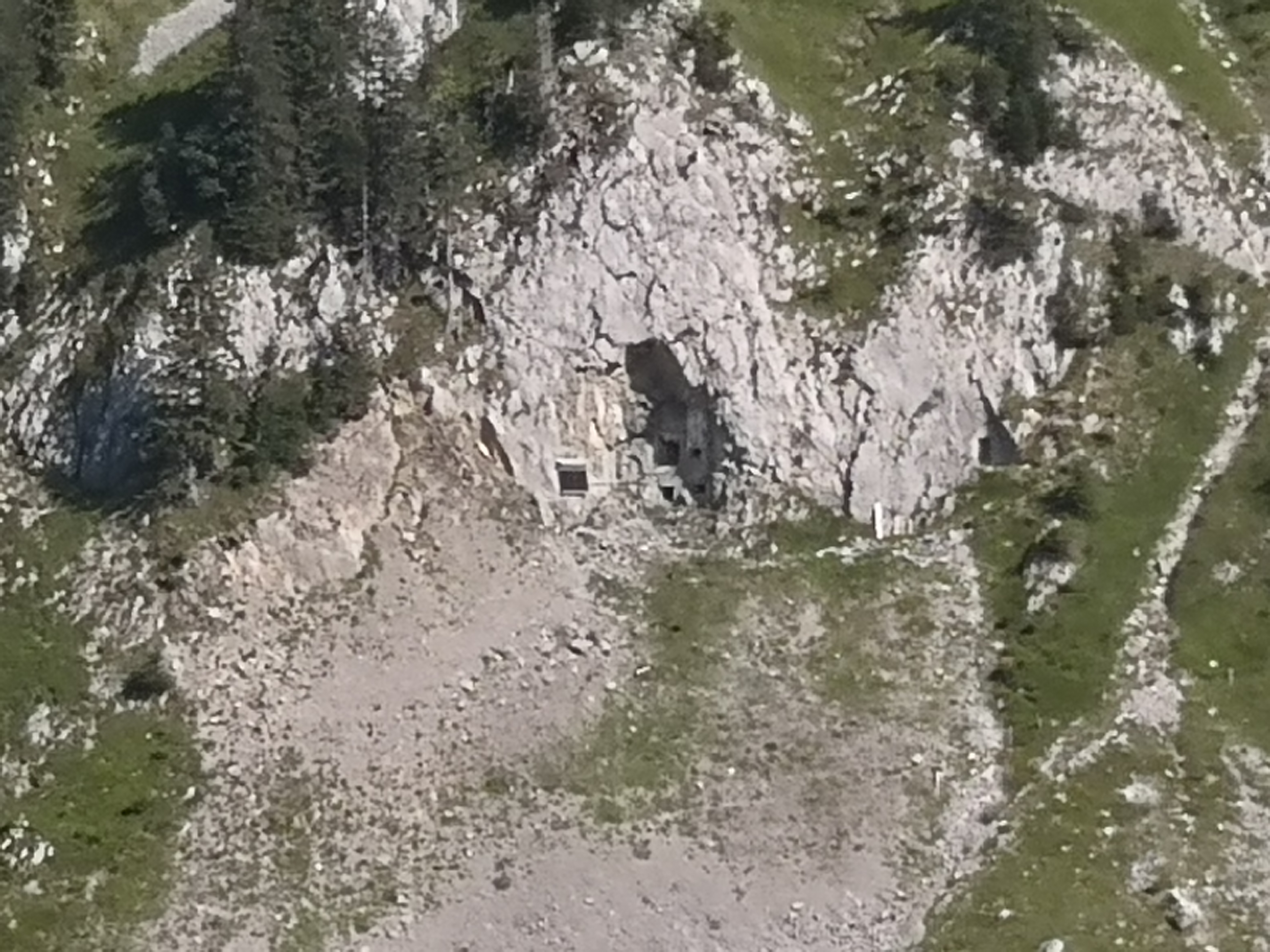 Euschelspass: Bunker (flankierendes Werk des Festung Euschels) am Südwestfuss des Schafberges. Links die Schiessscharten; Rechts der Eingang. Ansicht ohne Tarnung.